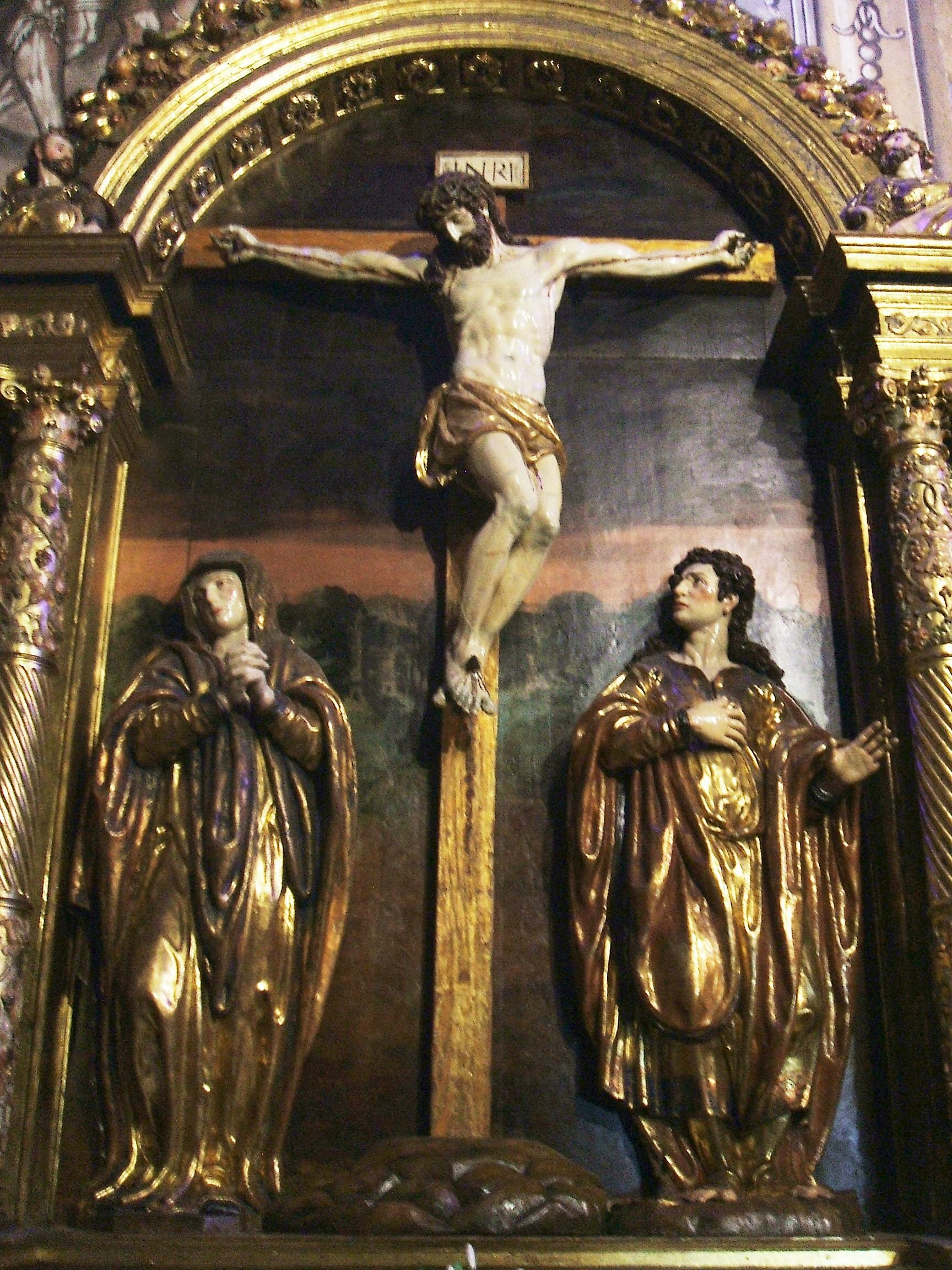 Retablo del Calvario, ubicado en el brazo izquierdo del crucero de la iglesia del Monasterio de Santa María Magdalena (MM Agustinas), en Medina del Campo, Valladolid, Castilla y León, España. Obra de Esteban Jordán, contratada en 1571 por Juan de Ahumada Hormaza, aquí enterrado